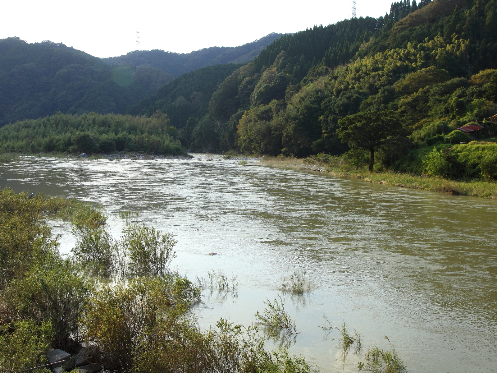 豊田市有間町、2011年